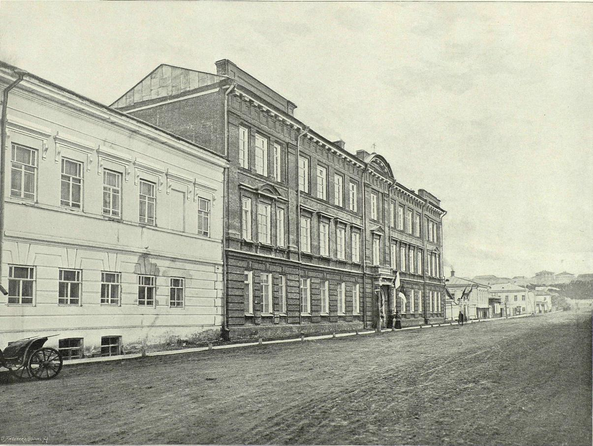 Томск. Мариинская женская гимназия